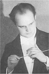 Fricsay Ferenc magyar karmester